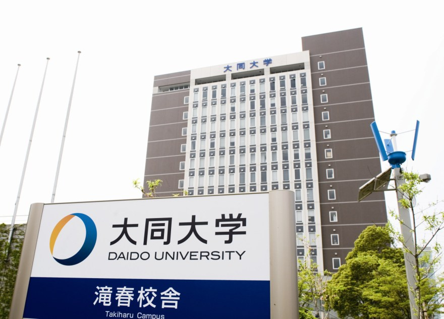 愛知県名古屋市にある大同大学